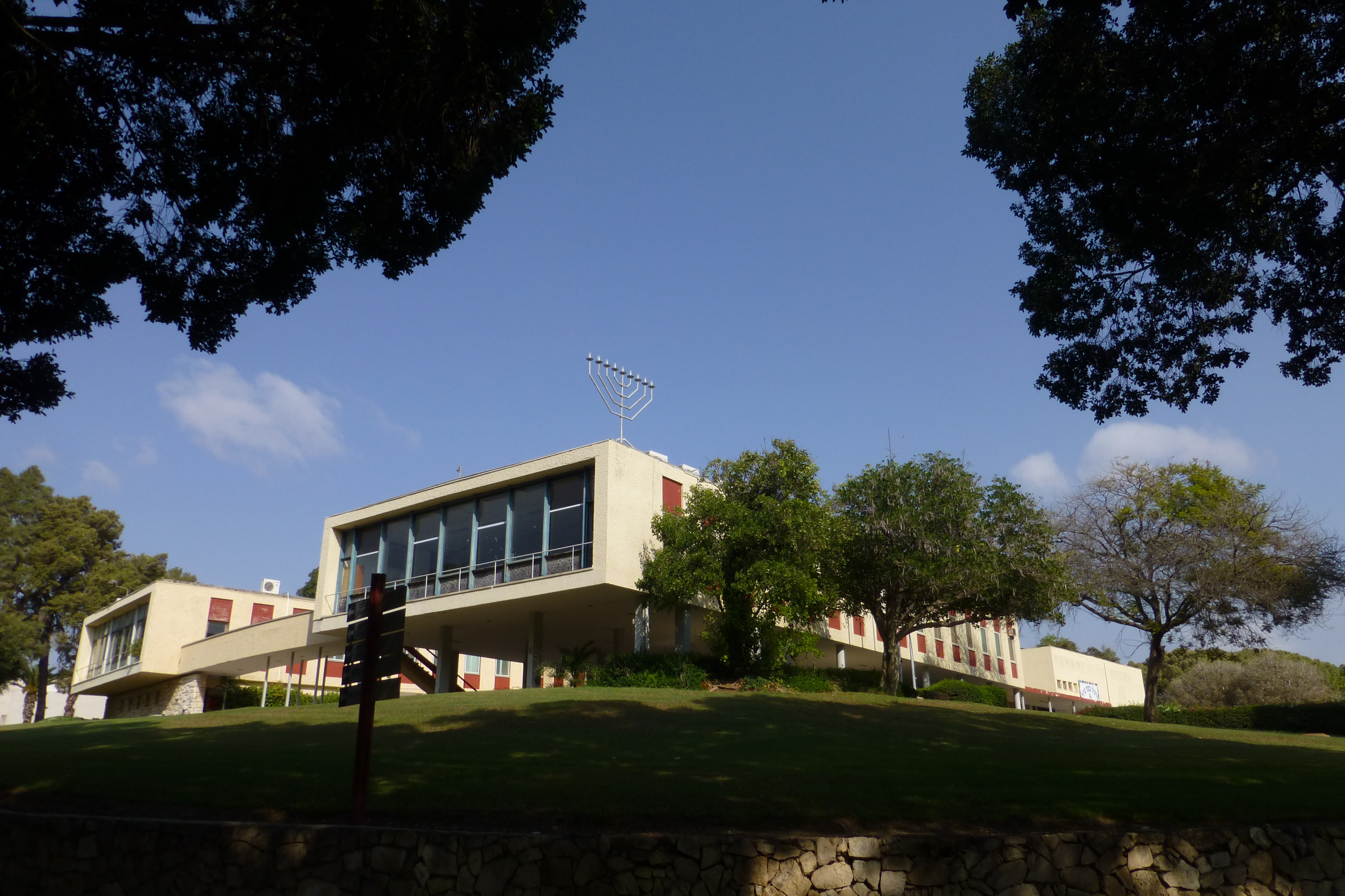 חדר האוכל